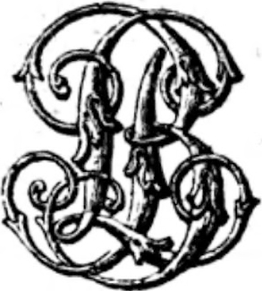 Logo Vecchio di Le Monnier Scuola